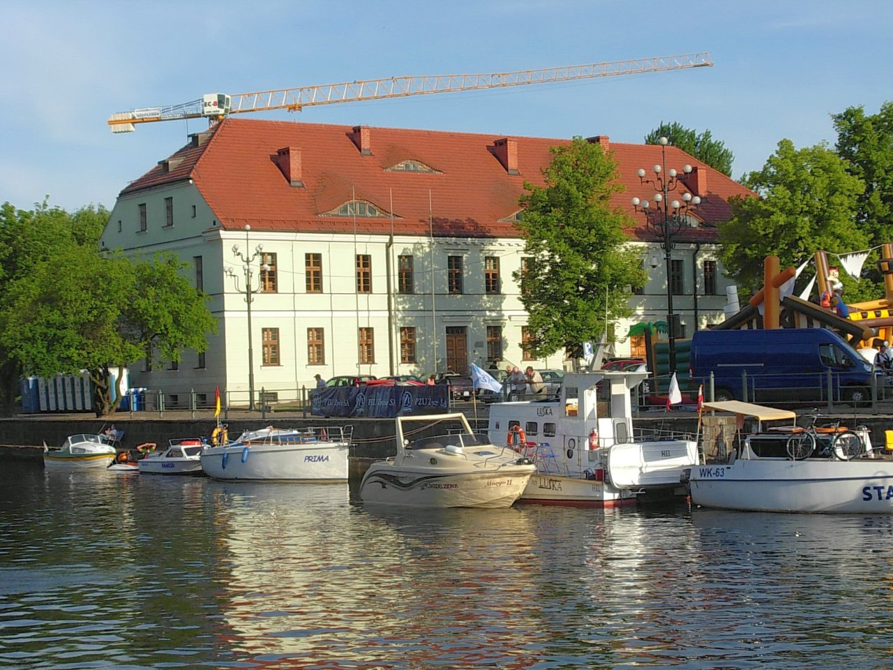 Budynek Inspektoratu PZU w Bydgoszczy